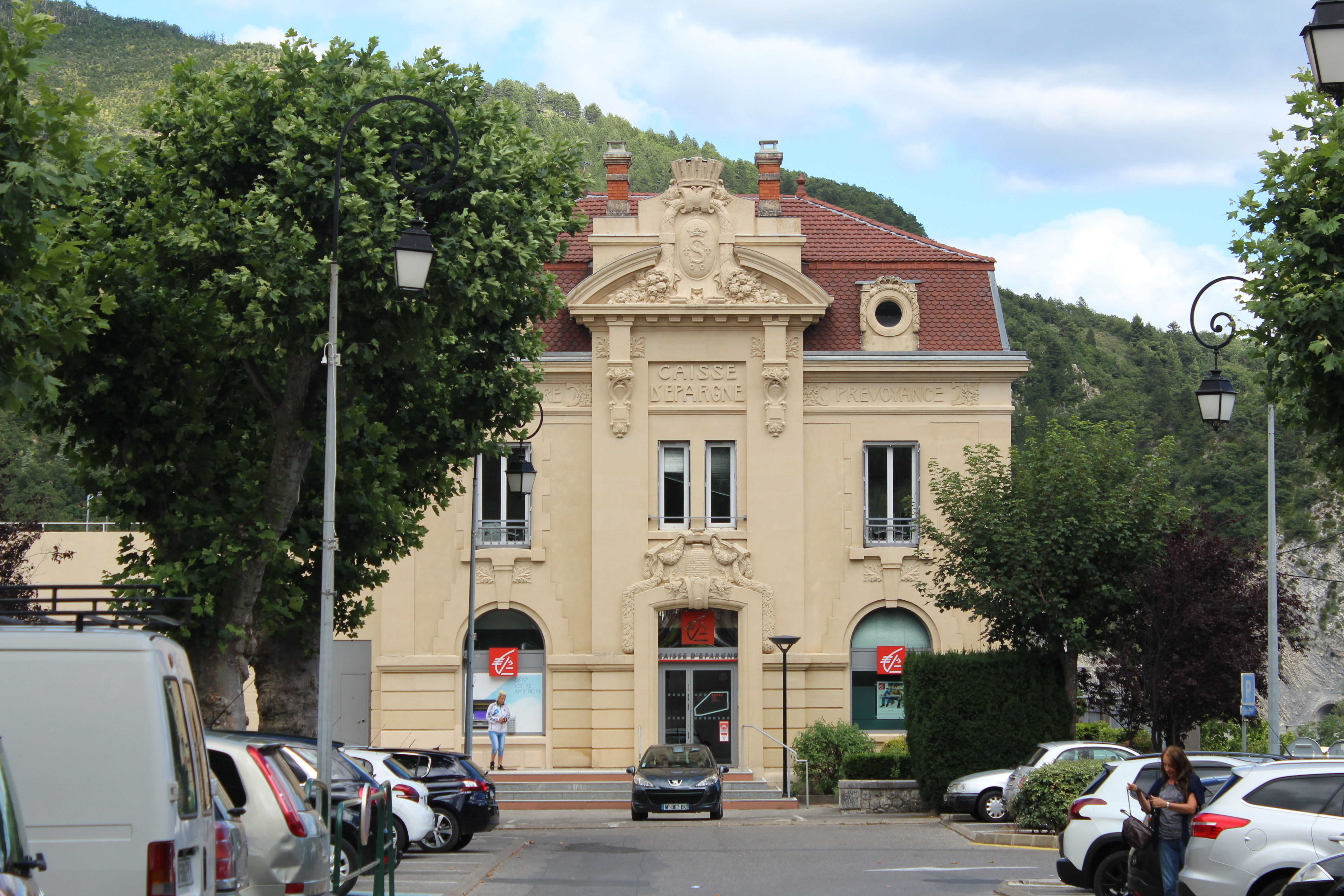 Agence de la Caisse d'Épargne, Sisteron.